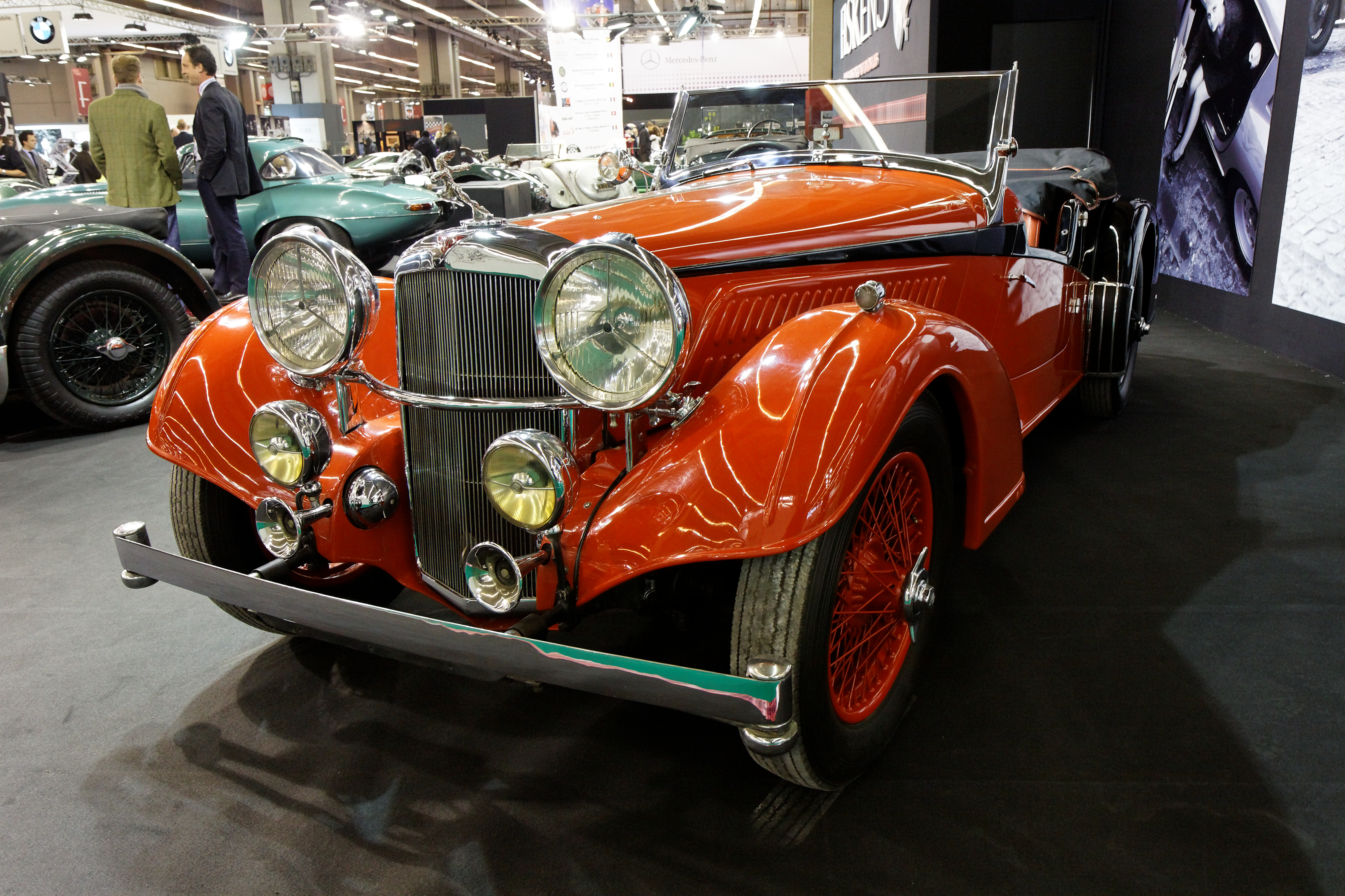 Photographie prise lors du salon rétromobile 2011 à Paris, porte de Versailles.